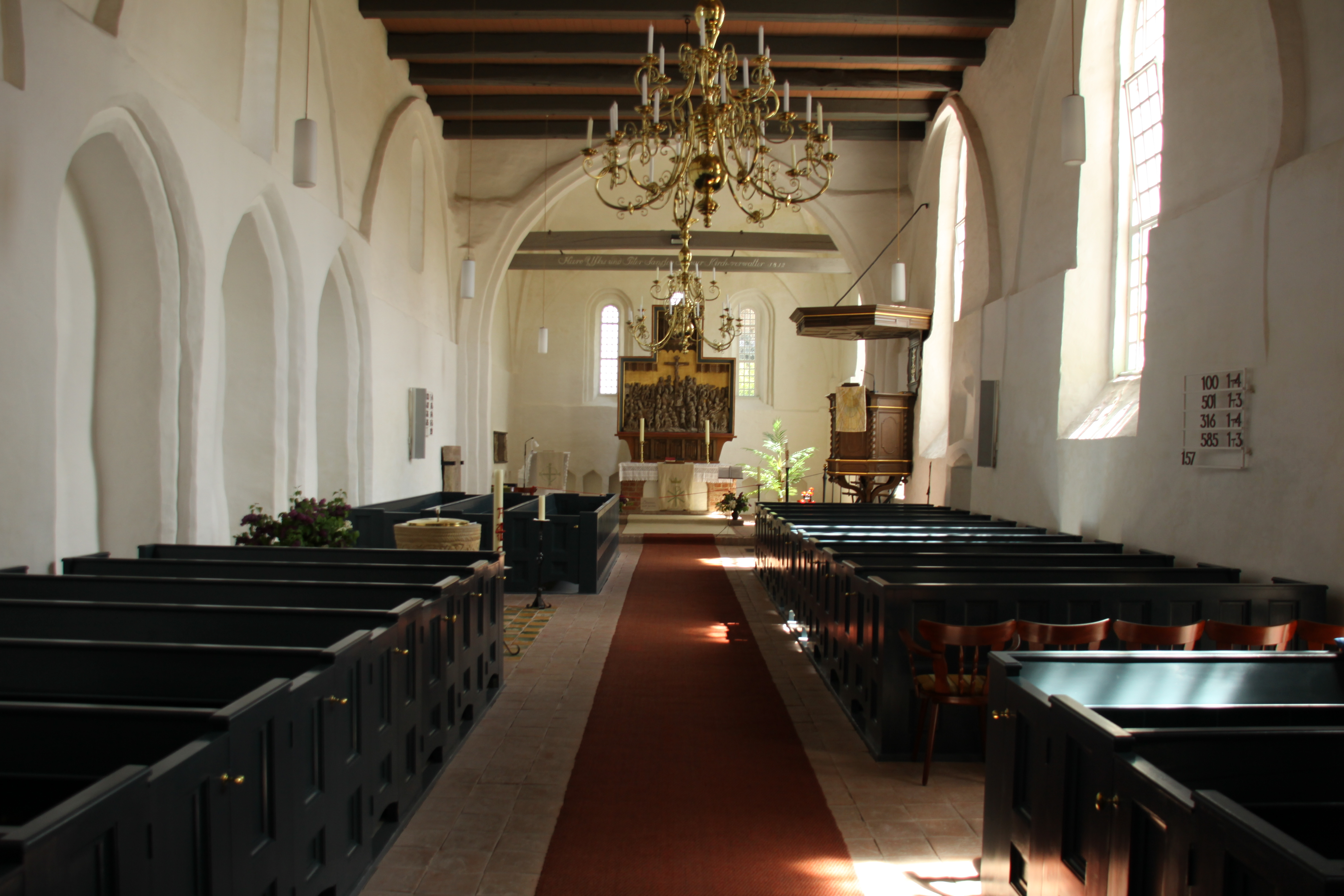 Innenraum der Loquarder Kirche